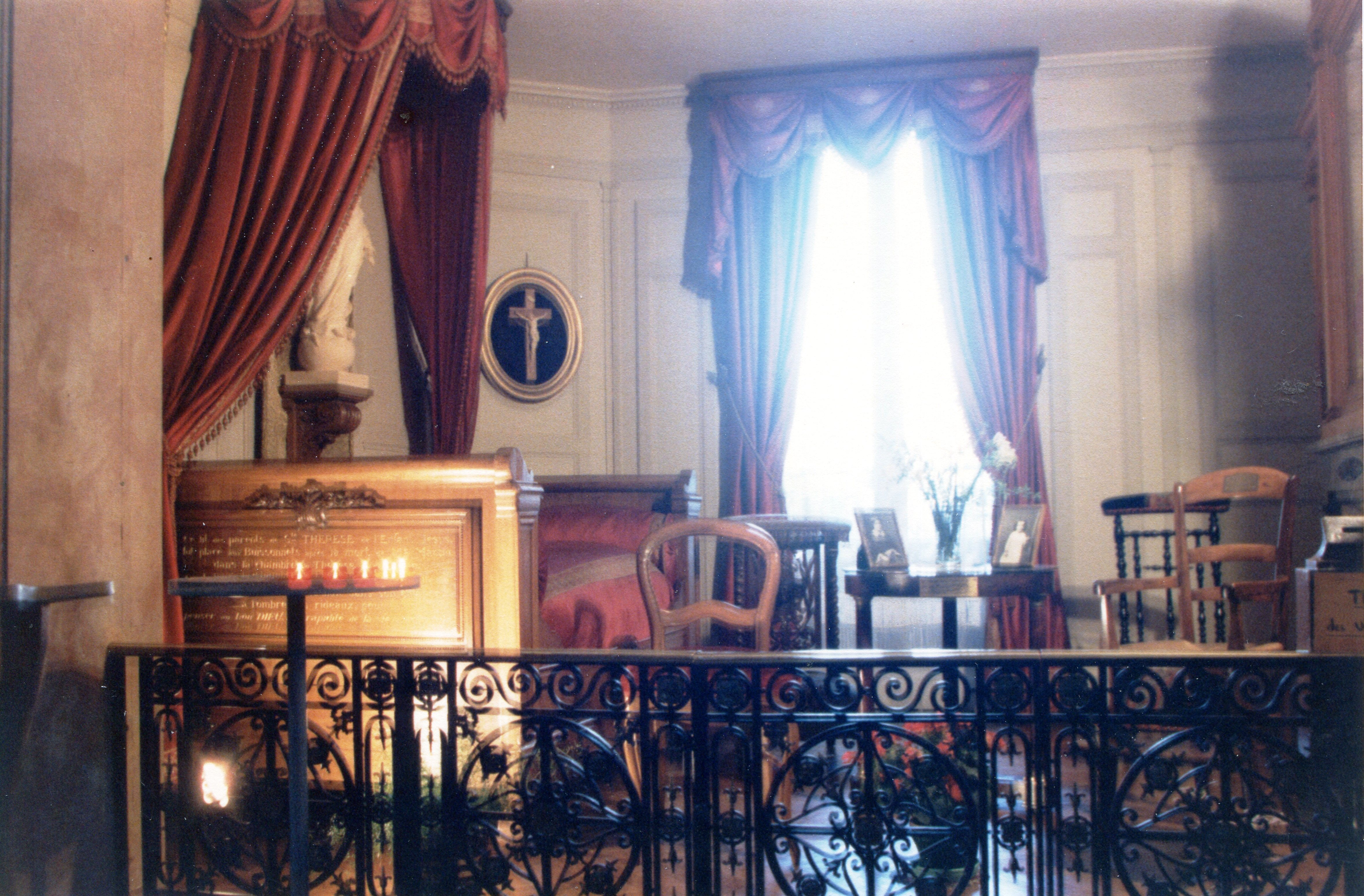 Alençon - Chapelle de la maison Martin - juillet 1986 La chambre natale de la Sainte